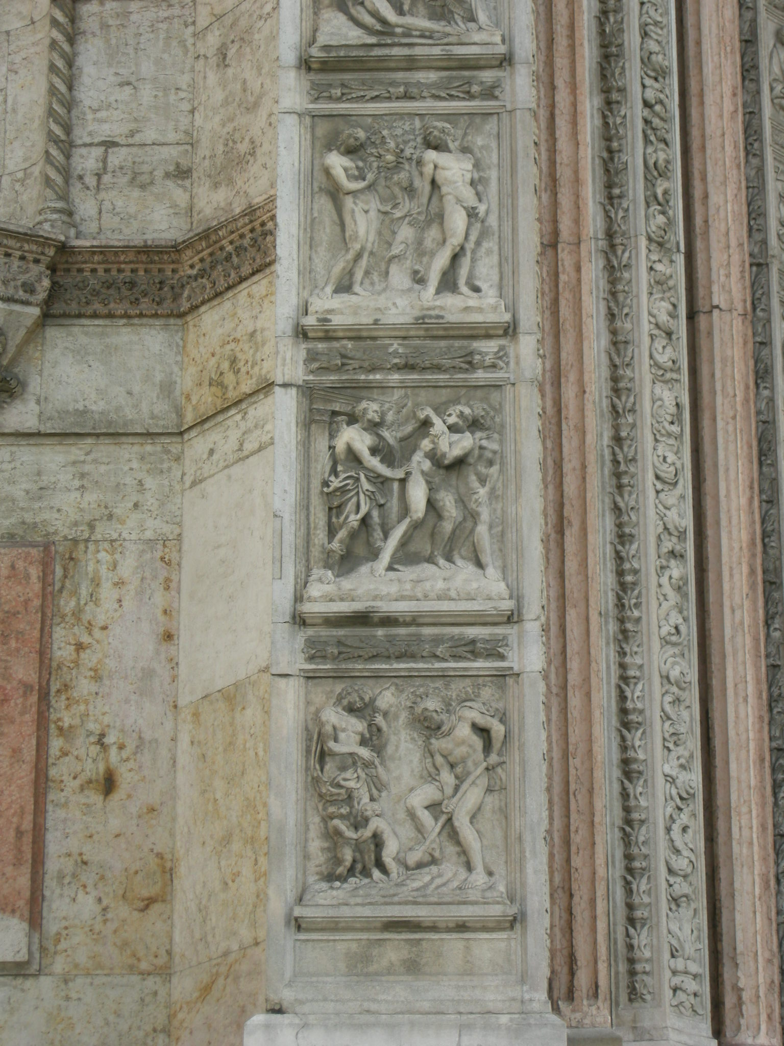 San petronio, portale maggiore, stipiti di jacopod ella quercia con storie della genesi